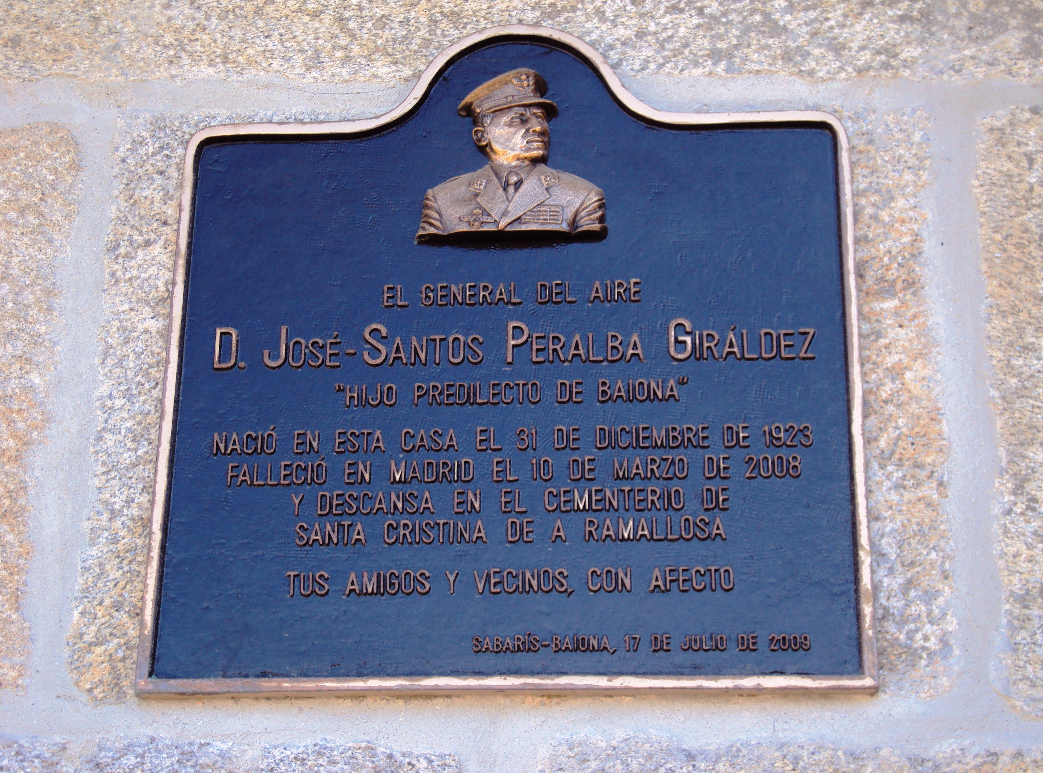 Placa na casa natal do xeneral José Santos Peralba, en Sabarís, Baiona.